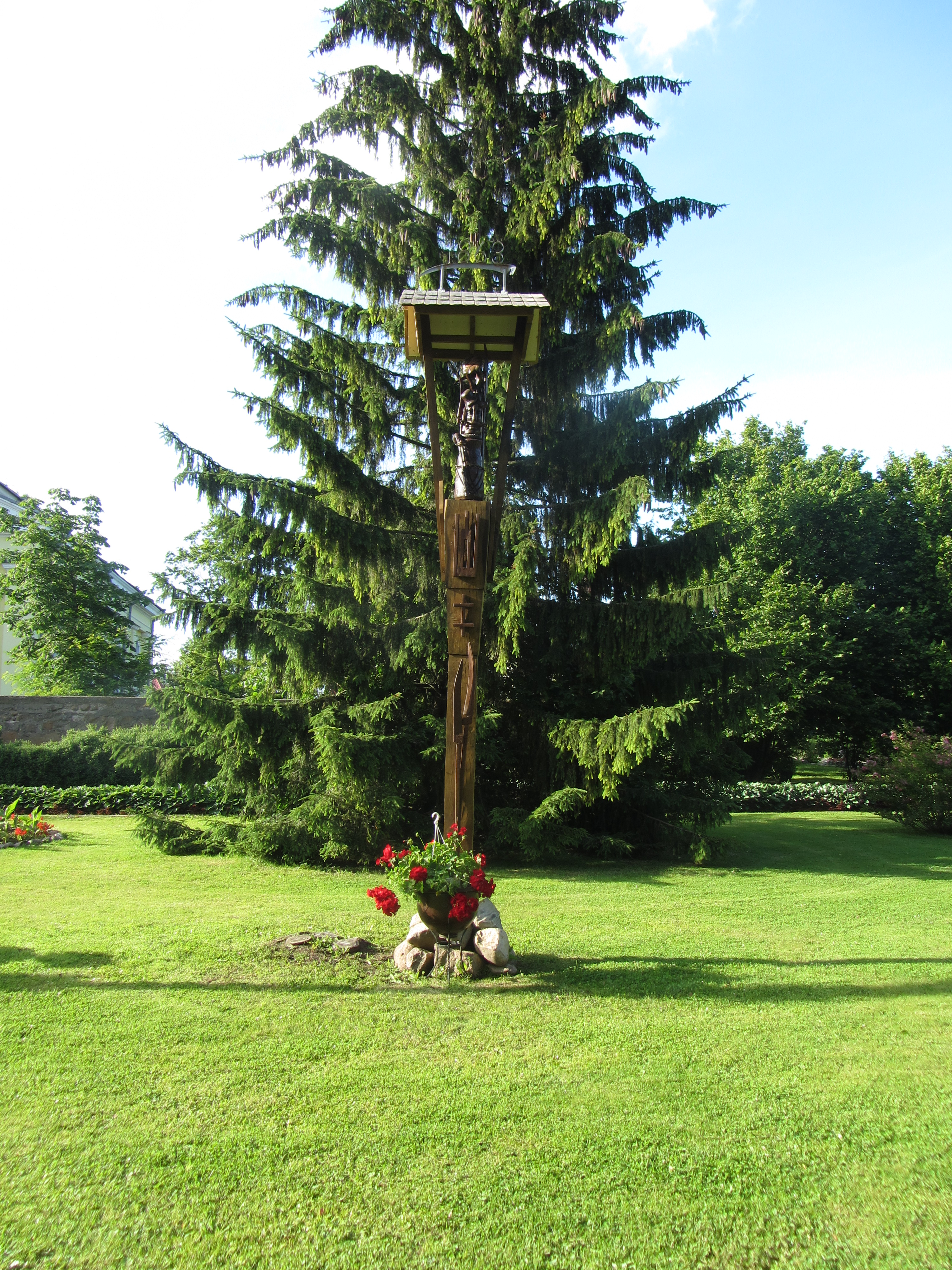 Mielagėnai, Lithuania